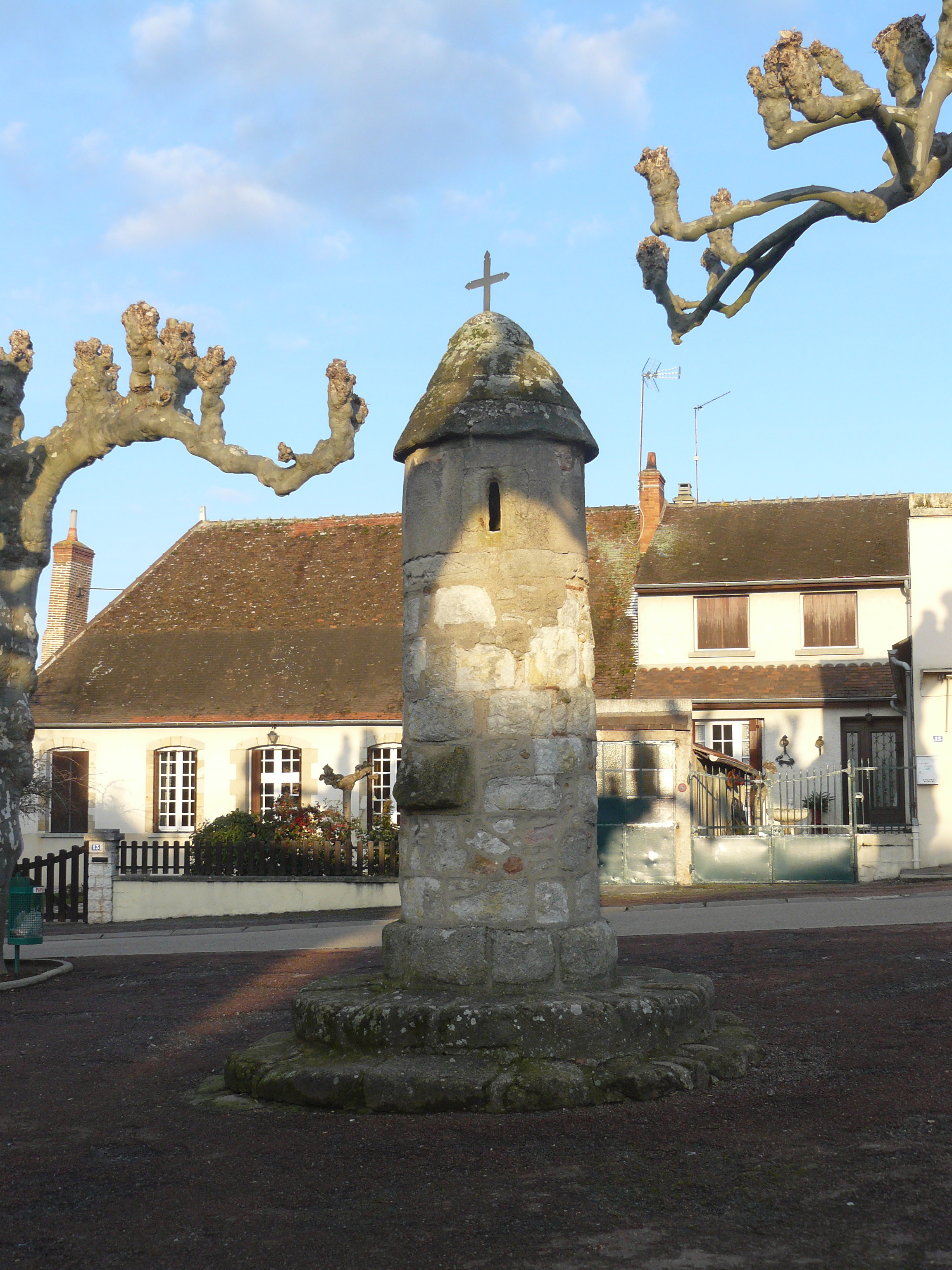 La lanterne des morts à Estivareilles dans l'Allier (France)